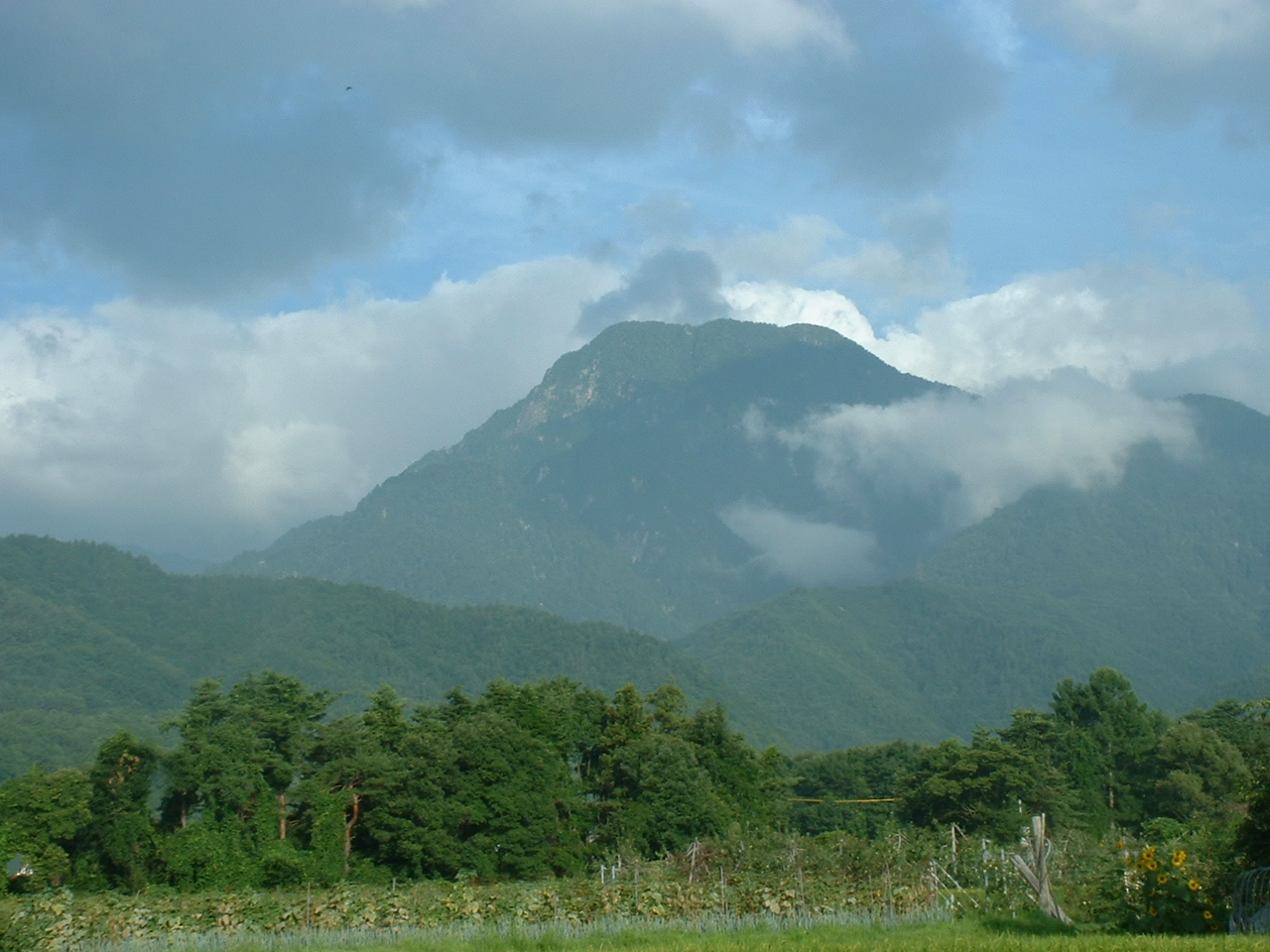 長野県安曇野市、同県北安曇郡松川村に位置する有明山